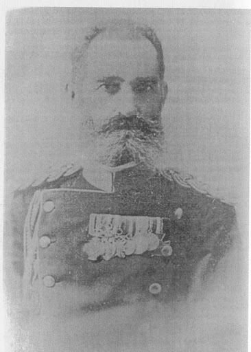 Jovan_Atanackovic